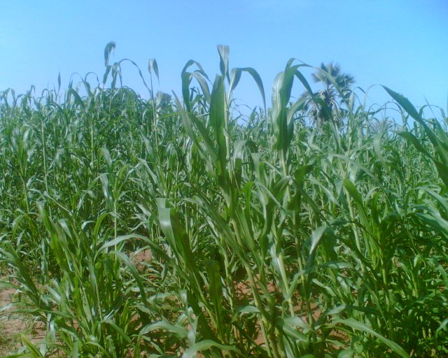 Un champ de petit mil à Bamoussobougou